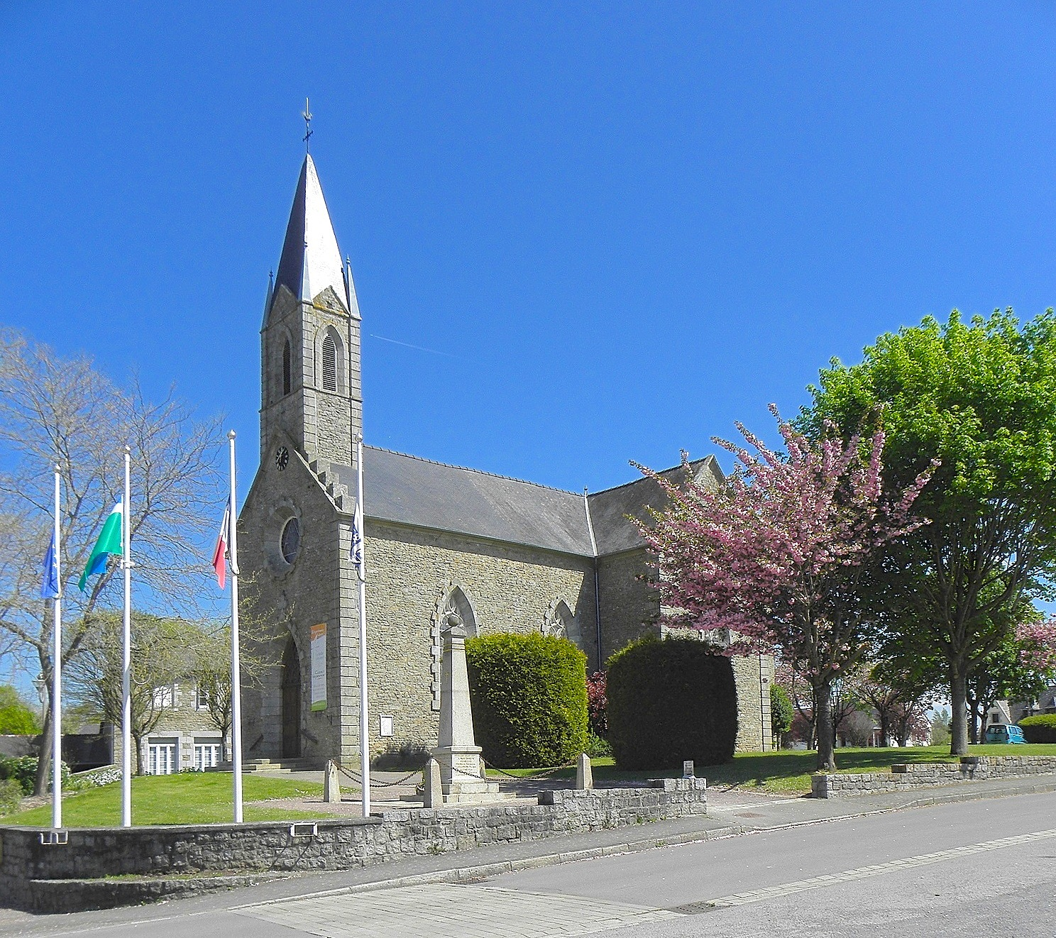 Église Saint-Samson de Bobital (22). Façade occidentale et flanc sud.